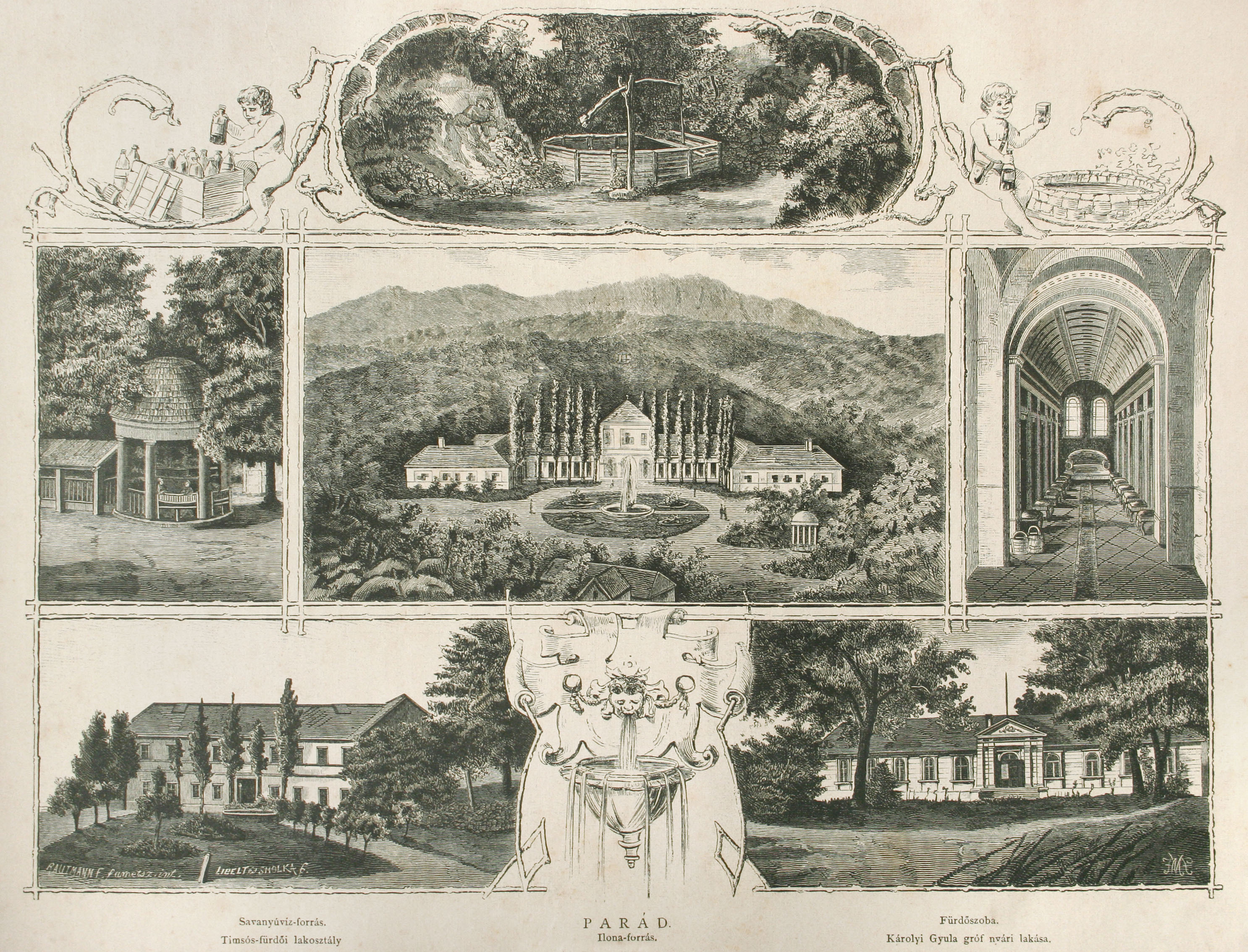 Parád nevezetességei. 1880. (Ország Világ c. folyóirat, 1880. XVIII. füzet, szkennelte szerkesztő Takkk)